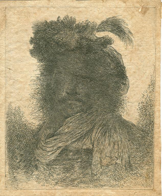 Estampe 18 x 14,8